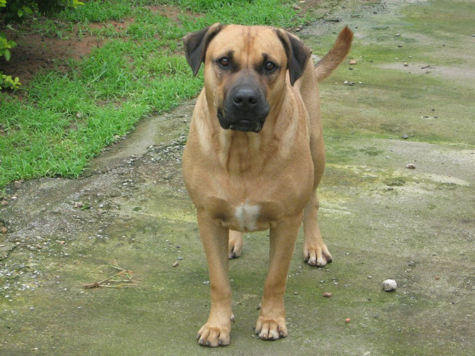 Cimarron Uruguayo - Canil La Fogueira